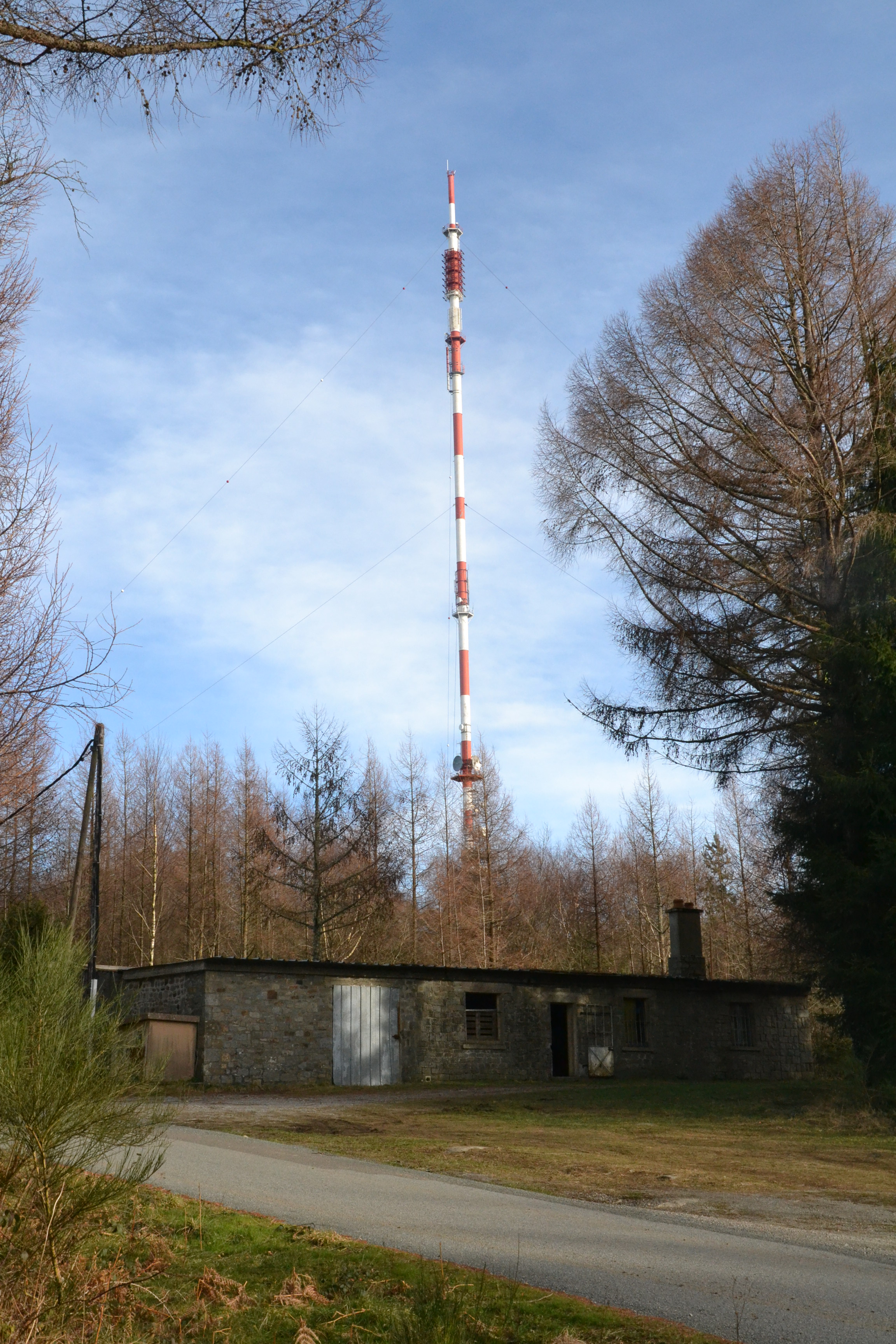 L'émetteur FM/TV du Maupuy, à Saint-Léger-le-Guérétois (Creuse, France)